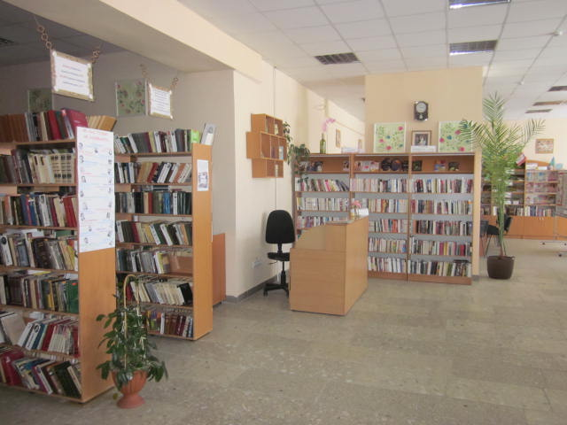 Сектор обслуговування мкр-ну Будівельників